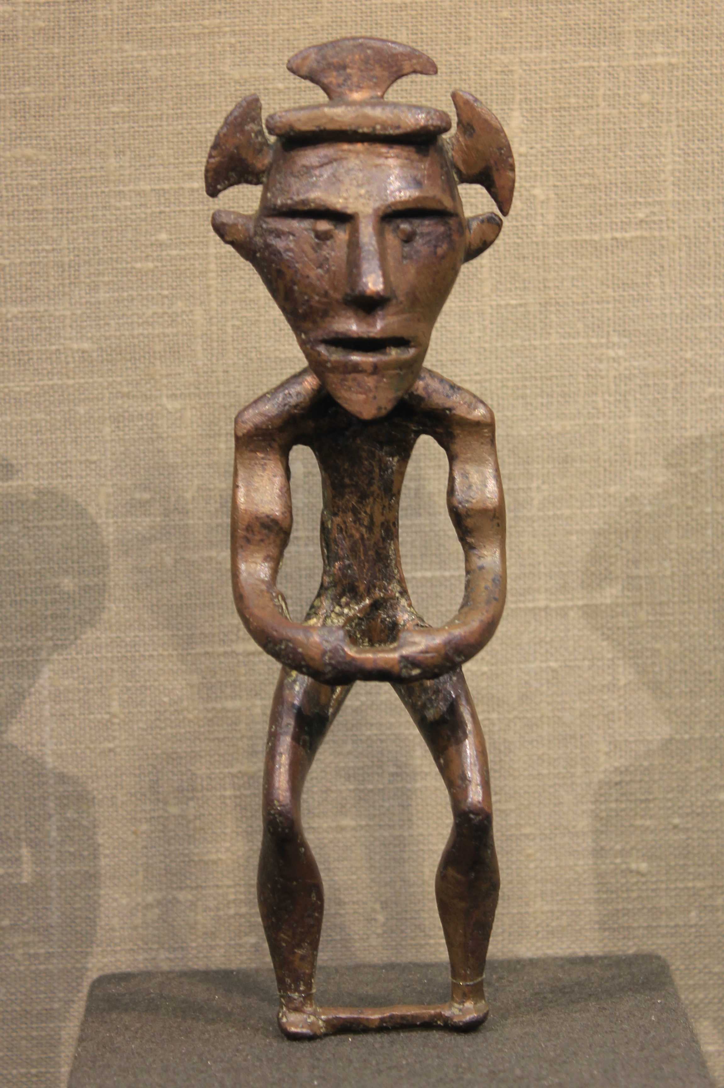 Objet conservé au musée national d'Histoire de Moscou